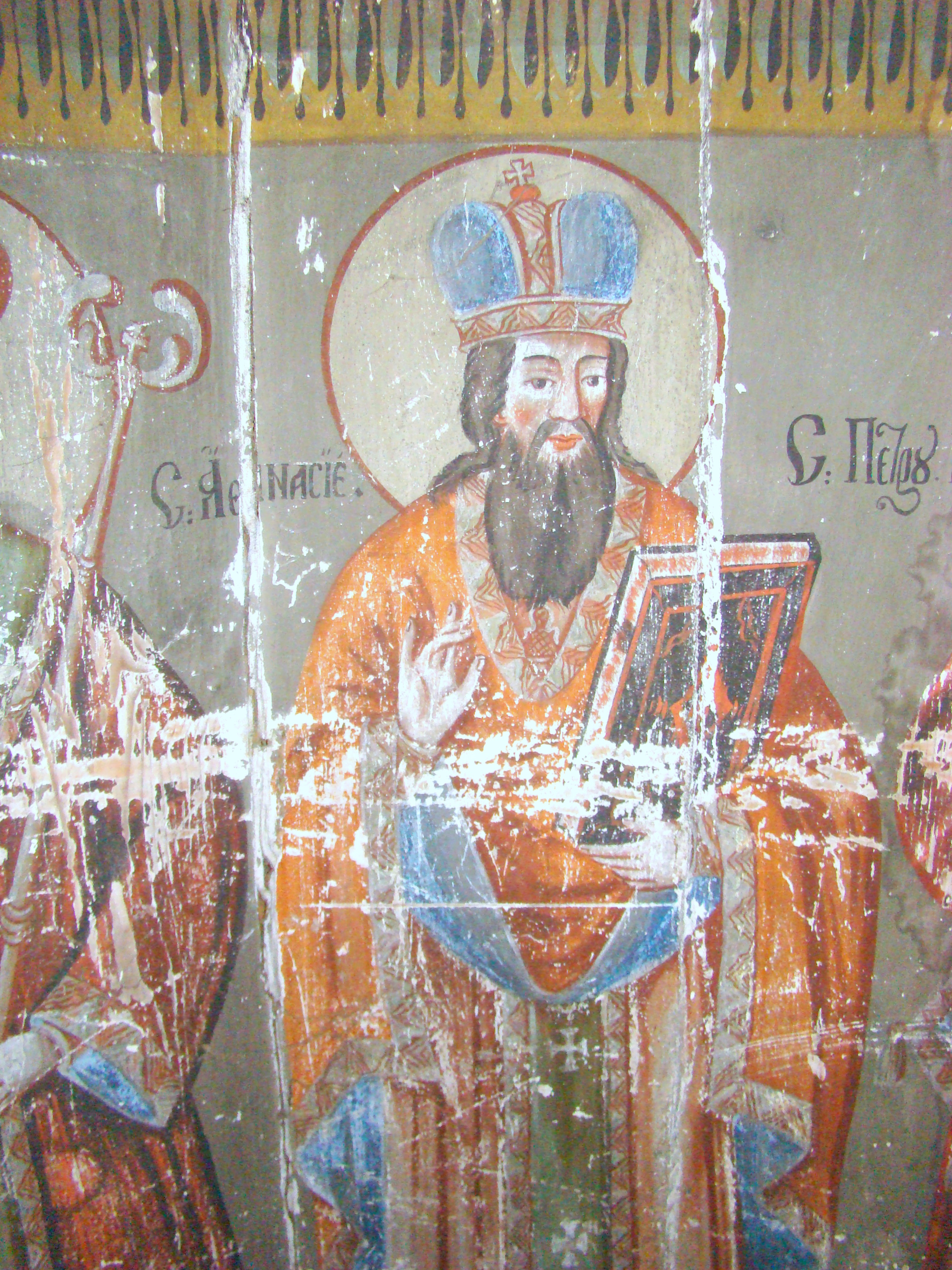 Biserica de lemn din Silivaș, județul Cluj